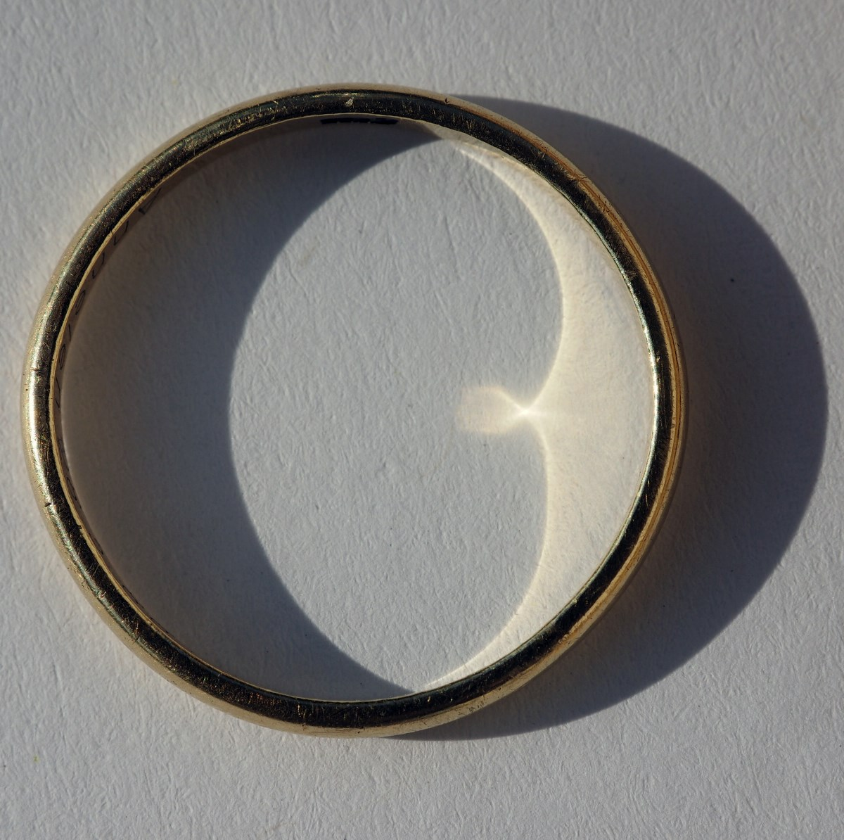 Katakaustik in einem Goldring im Sonnenlicht